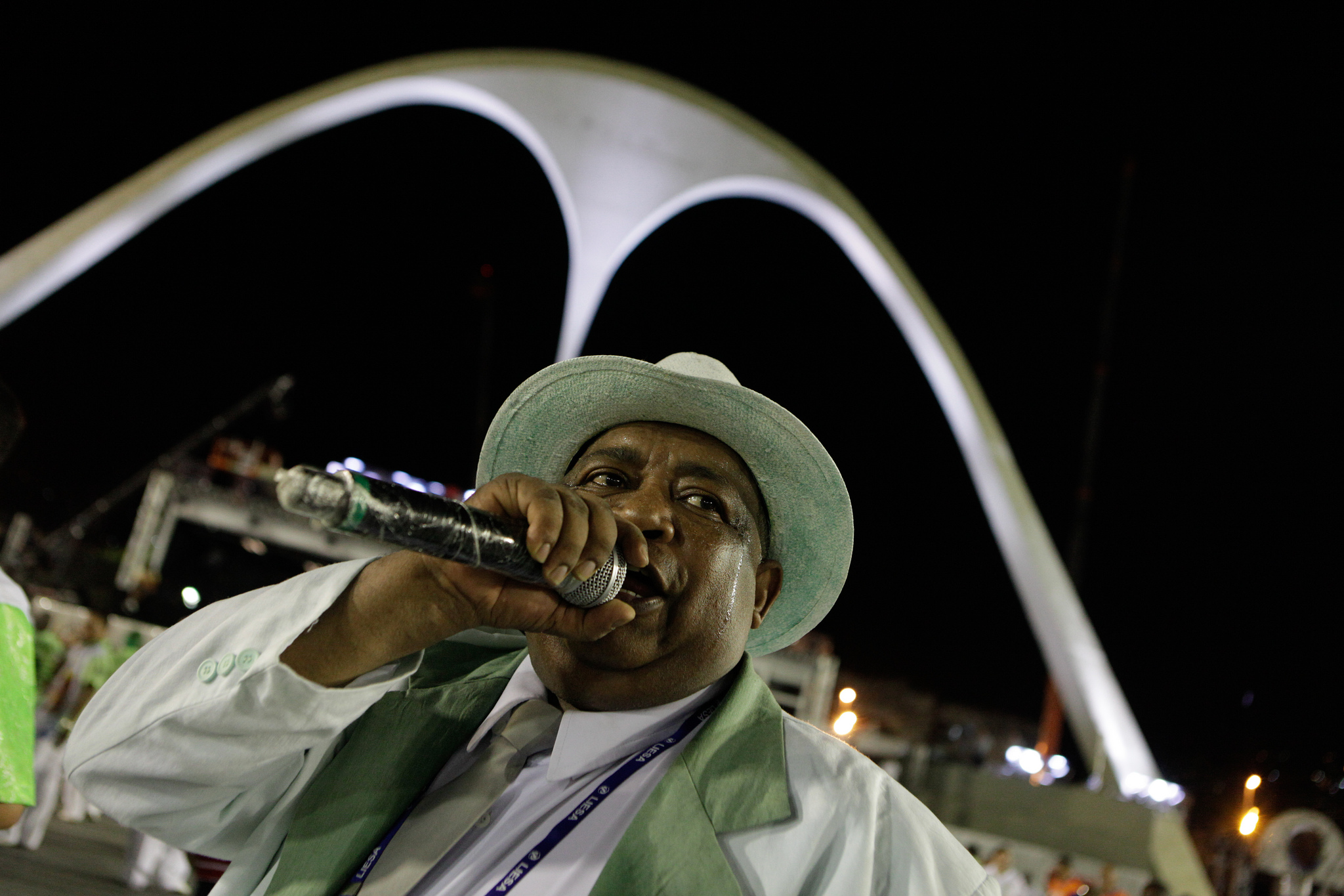 Rio de Janeiro - Desfile de carnaval na Sapucaí. (Gabriel Santos/Agência Brasil)